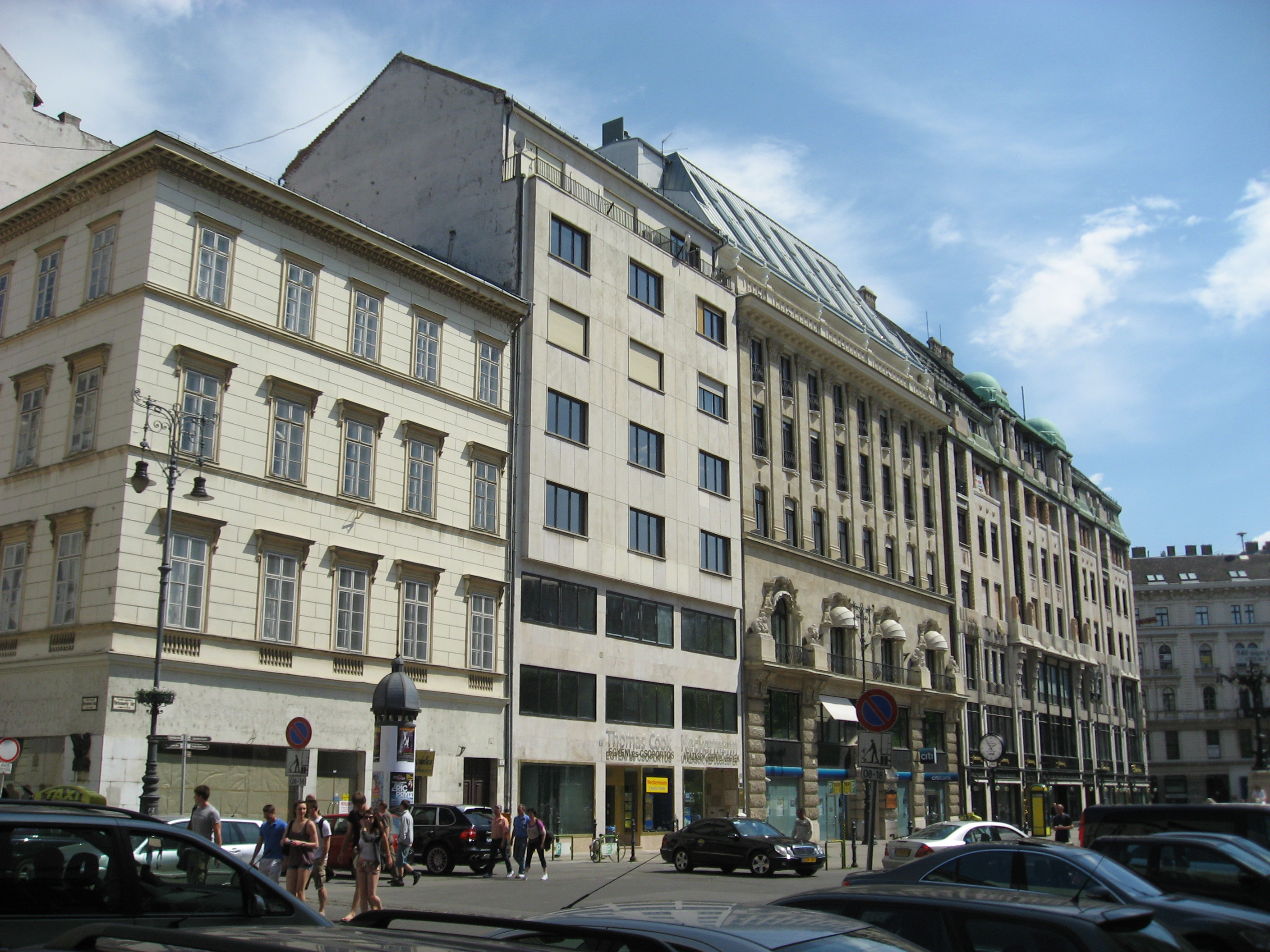 Budapešť Harmincad Street #1 and Vörösmarty Square #3, 4, 5